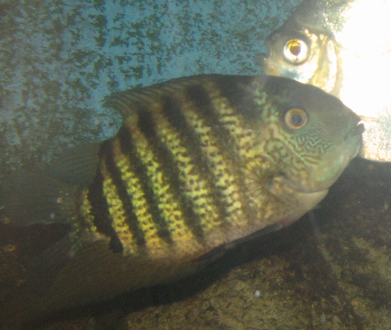 Green Severum - Heros serverus at louisville zoo